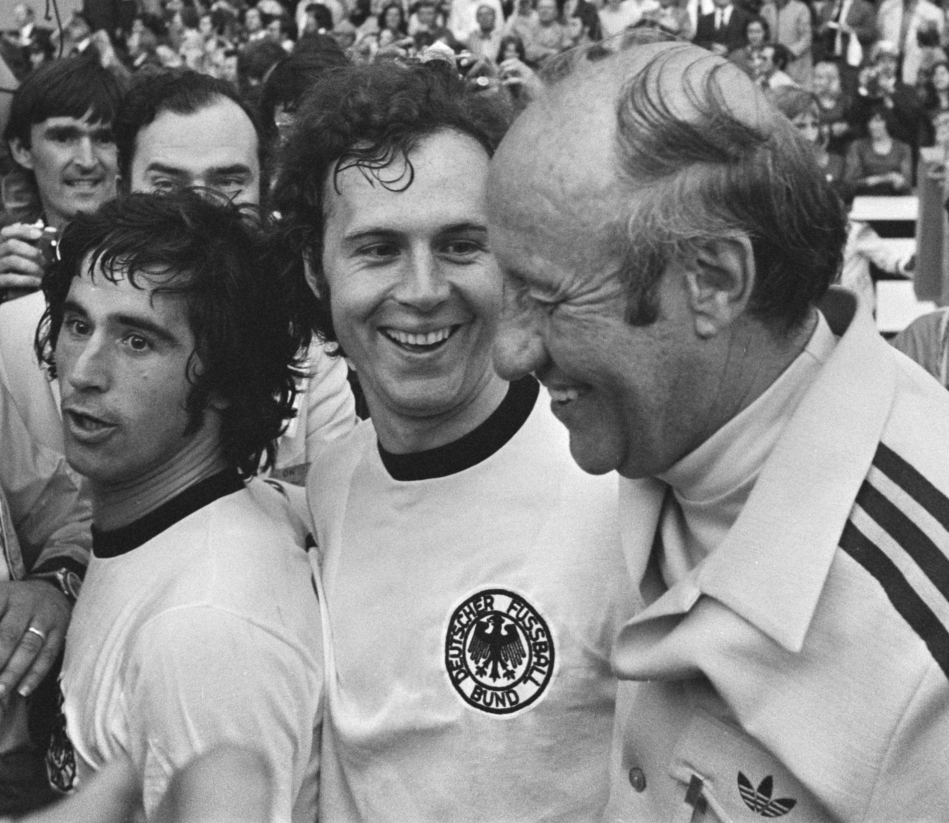 Finale wereldkampioenschap voetbal 1974 in Munchen, West Duitsland tegen Nederland 2-1; v.l.n.r. Muller, Beckenbauer en trainer Schon na afloop.